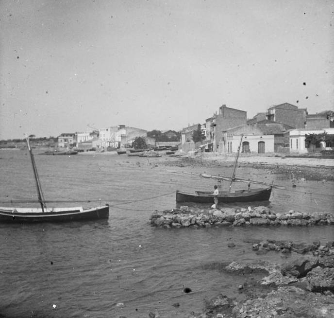 Nova vista de la platja de l'Ampolla. Josep Salvany i Blanch (1916)